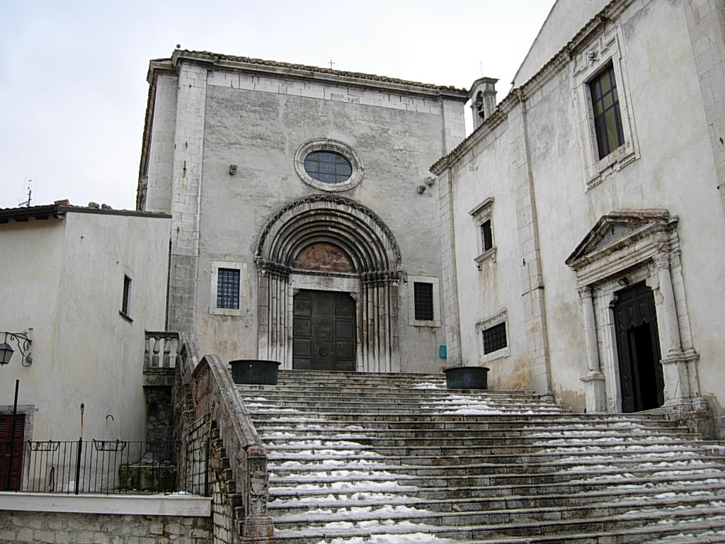 Basilica della Madonna del Colle a Pescocstanzo (AQ) Foto personale